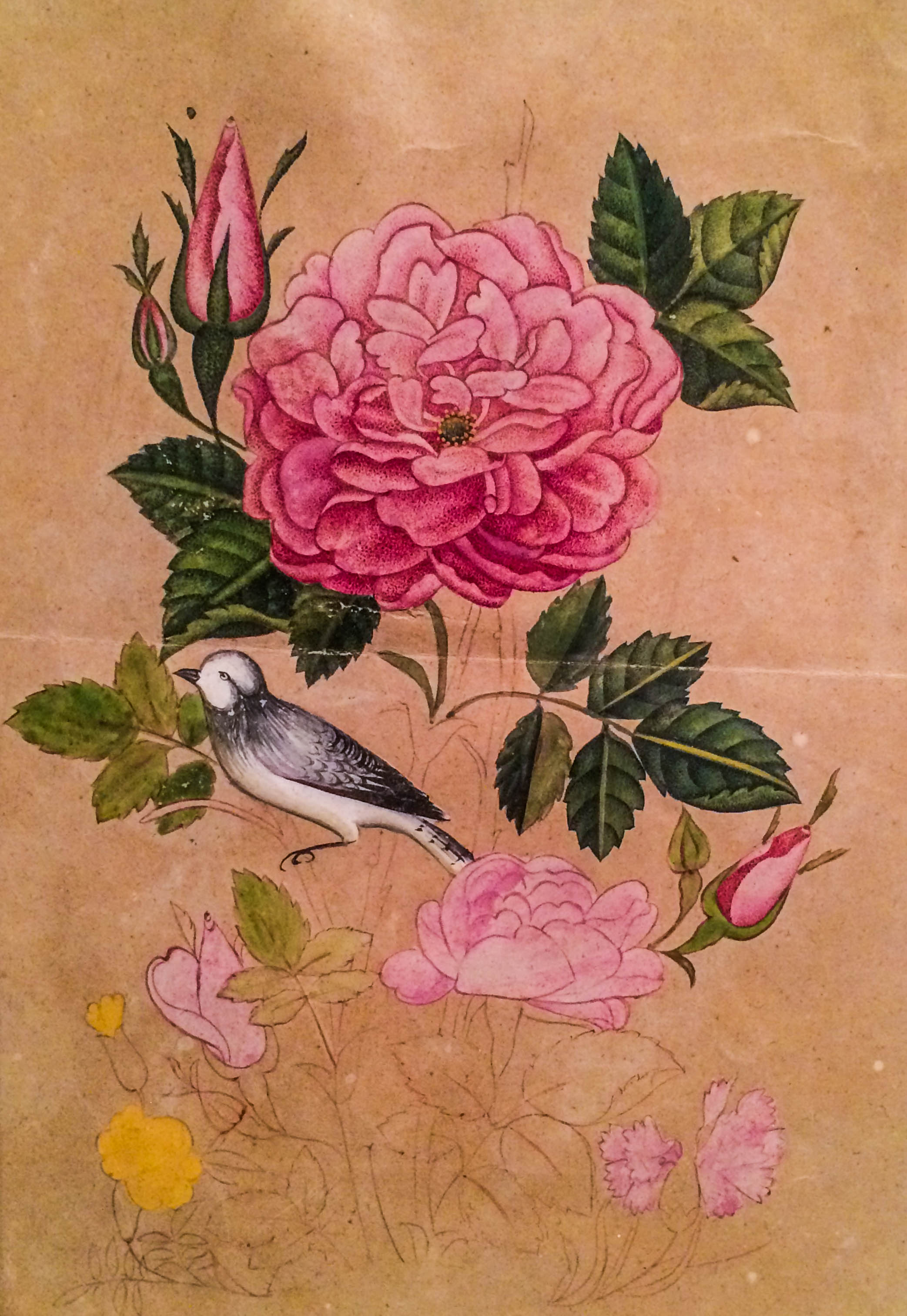 Mirzə Qədim İrəvani - Bülbül və qızılgül kolu